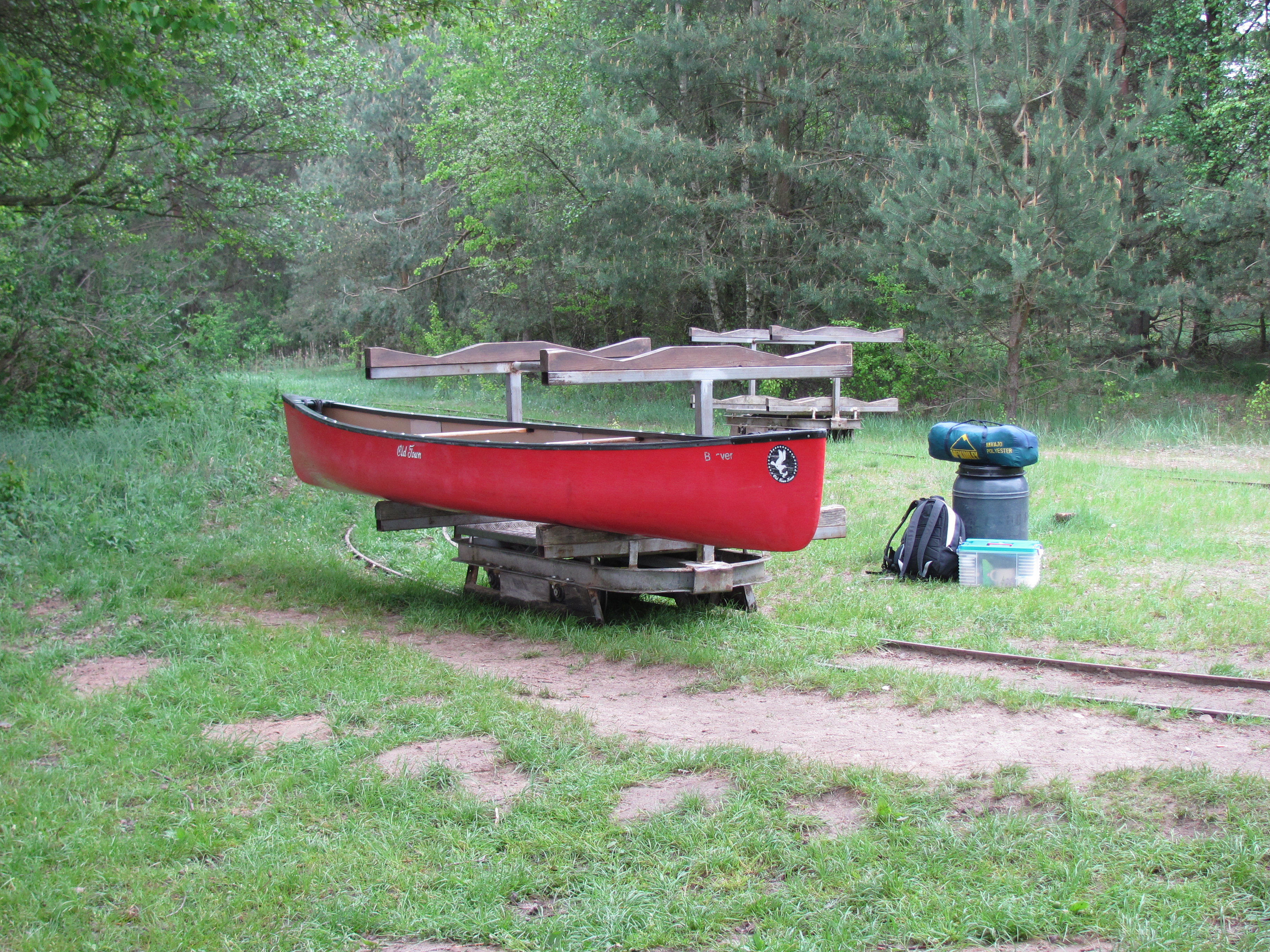 Lorenbahn an der Bootsumtragestelle zwischen Granziner Mühle und Pagelsee bei Kratzeburg